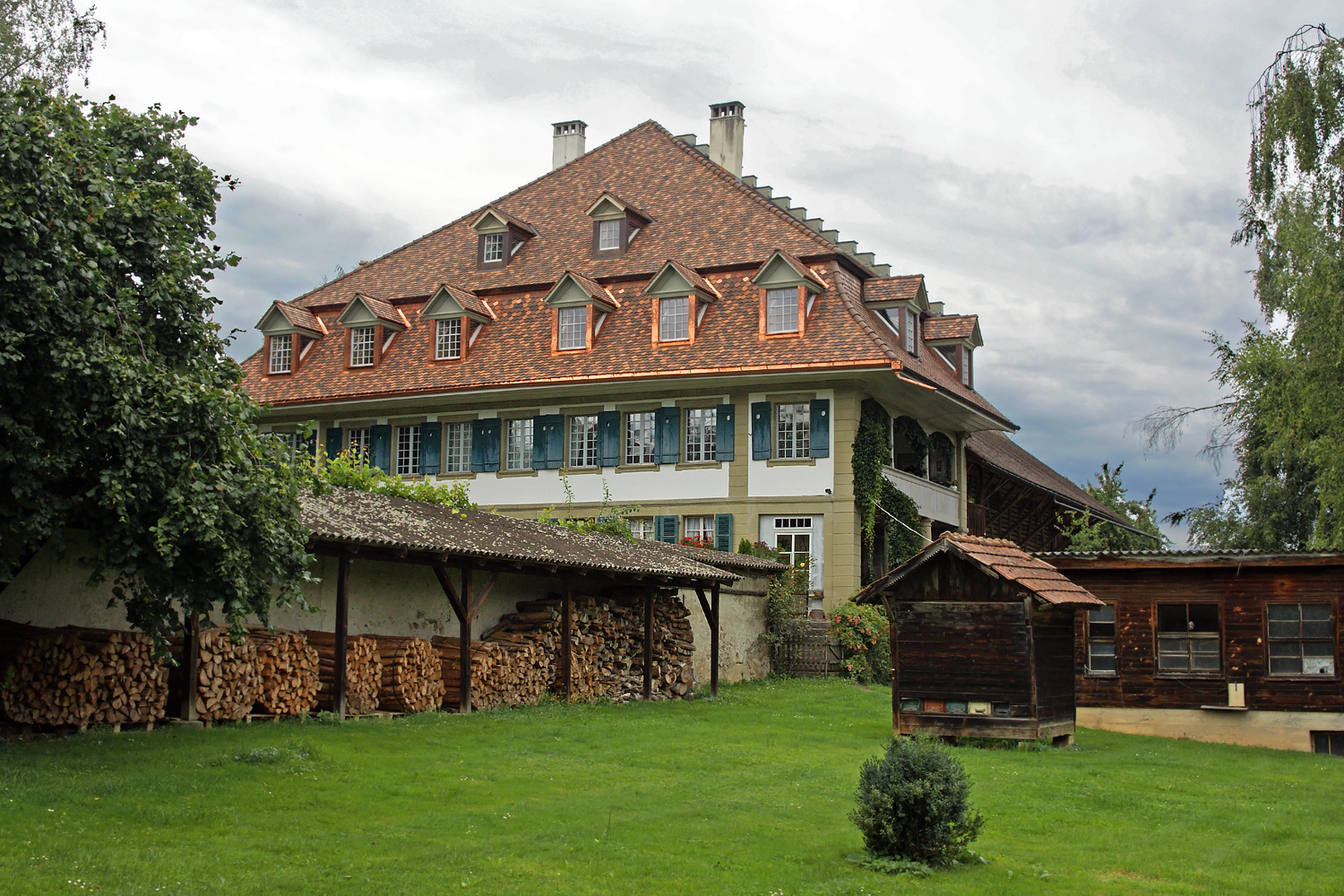 Herrenbauernhaus Alter Sandacher, Allmendingen bei Bern